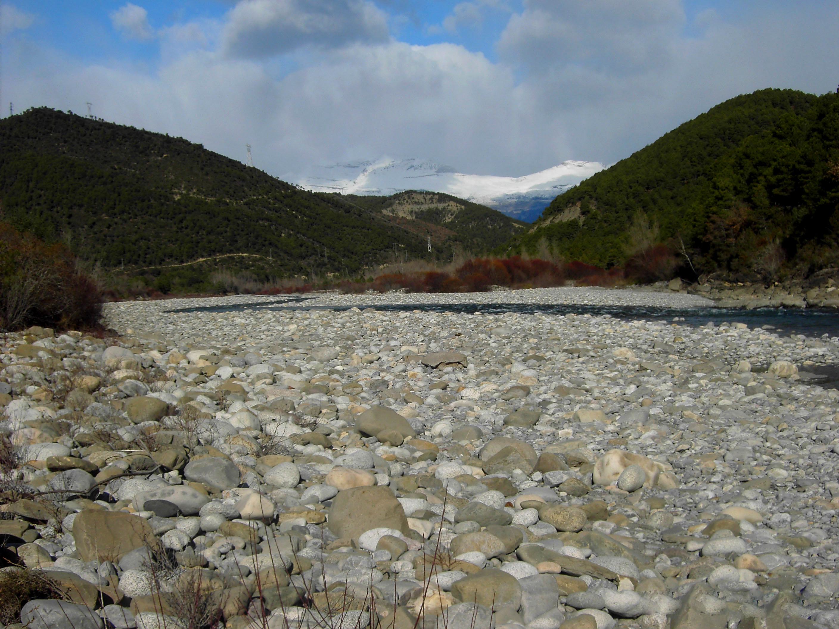 Aragonés: A Glera d'o río Zinca á'l canto d'A Buerda.